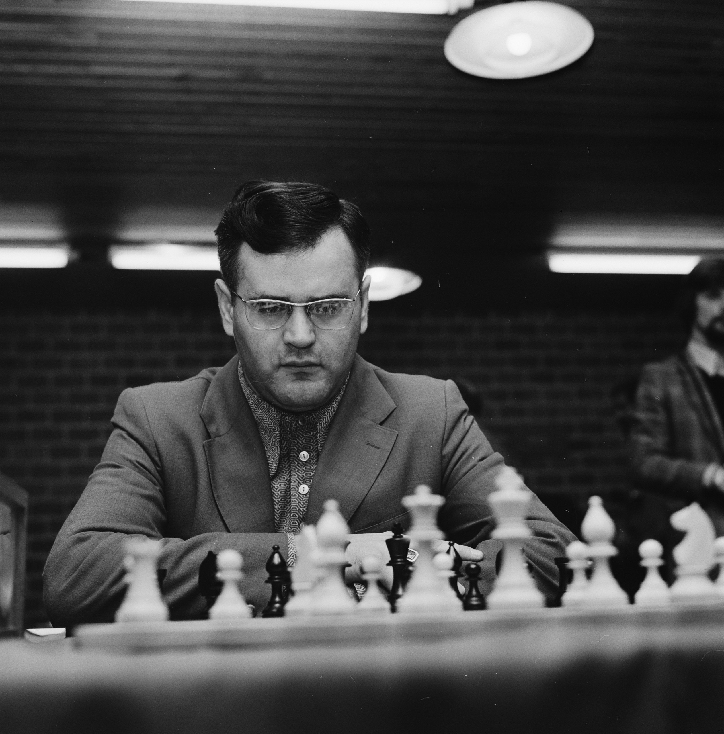 Collectie / Archief : Fotocollectie Anefo Reportage / Serie : Het Hoogovenschaaktoernooi te Wijk aan Zee Beschrijving : most probably Milan Matulović Datum : 17 januari 1974 Locatie : Noord-Holland, Wijk aan Zee Trefwoorden : portretten, schaken, schakers Persoonsnaam : Instellingsnaam : Hoogovenschaaktournooi Fotograaf : Mieremet, Rob / Anefo Auteursrechthebbende : Nationaal Archief Materiaalsoort : Negatief (zwart/wit) Nummer archiefinventaris : bekijk toegang 2.24.01.03 Bestanddeelnummer : 926-9499